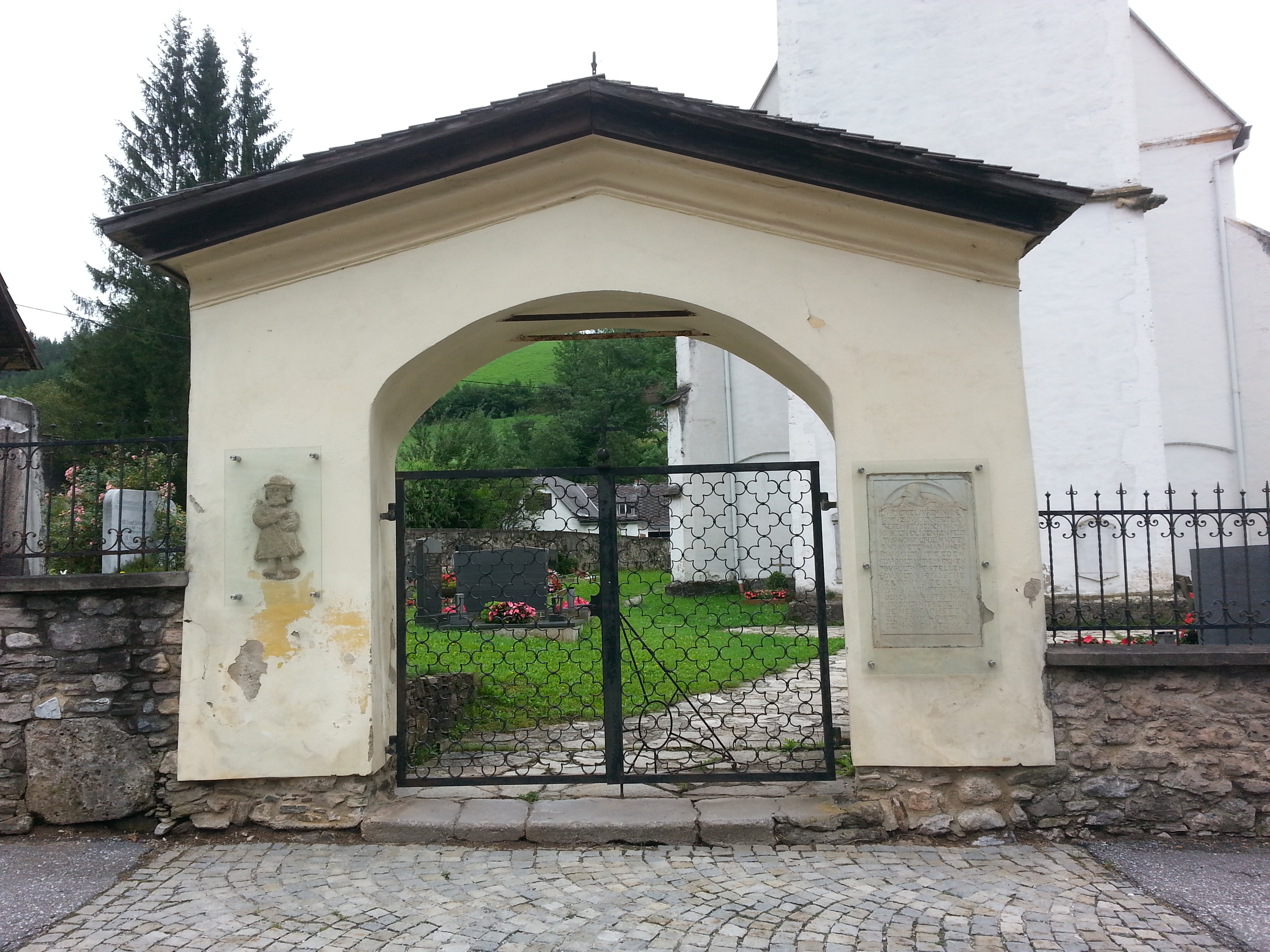 Kath. Pfarrkirche hl. Jakob mit Friedhof und Karner